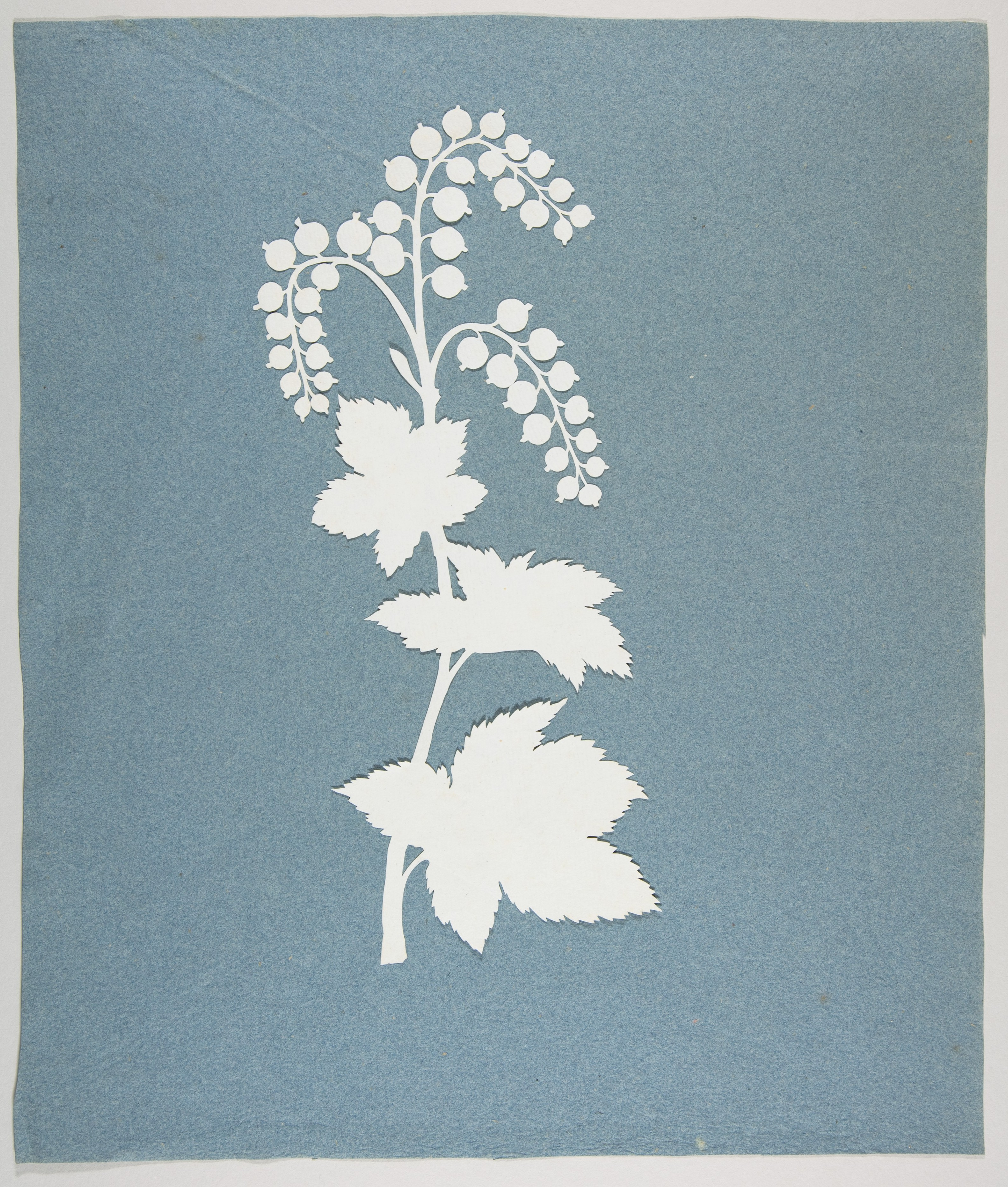 Cut paper; Cut Paper